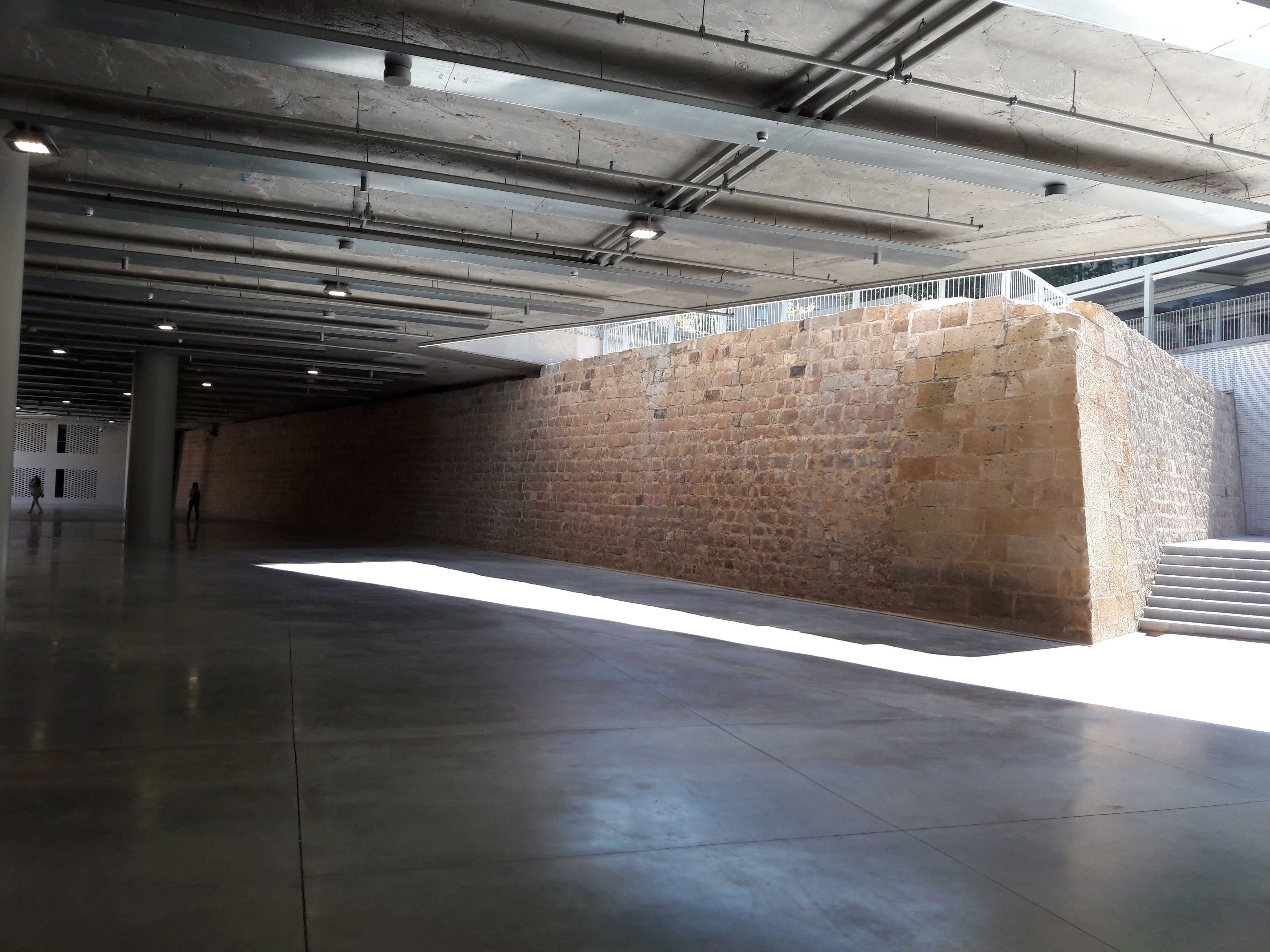 Bastione di Sant Antoni recuperato sotto al Mercato